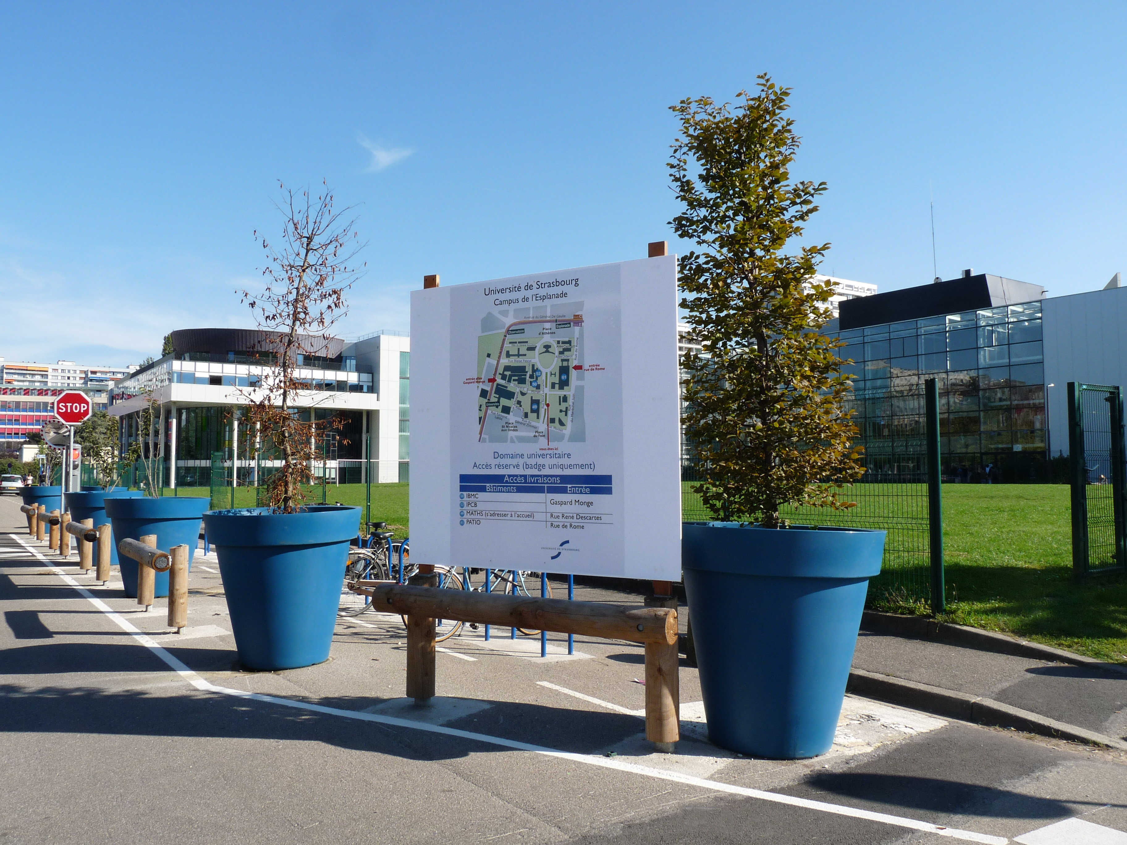 Université de Strasbourg : Campus de l'Esplanade ou Campus Central. A gauche, la Faculté de Droit. A droite, la Faculté des Lettres et Sciences humaines.